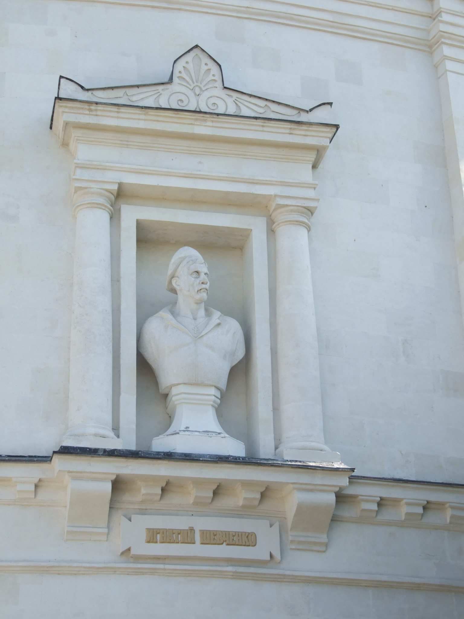 Меморіальний комплекс пам'яток оборони міста в 1854 - 1855 роках "Історичний бульвар" 1905 - 1959 роки